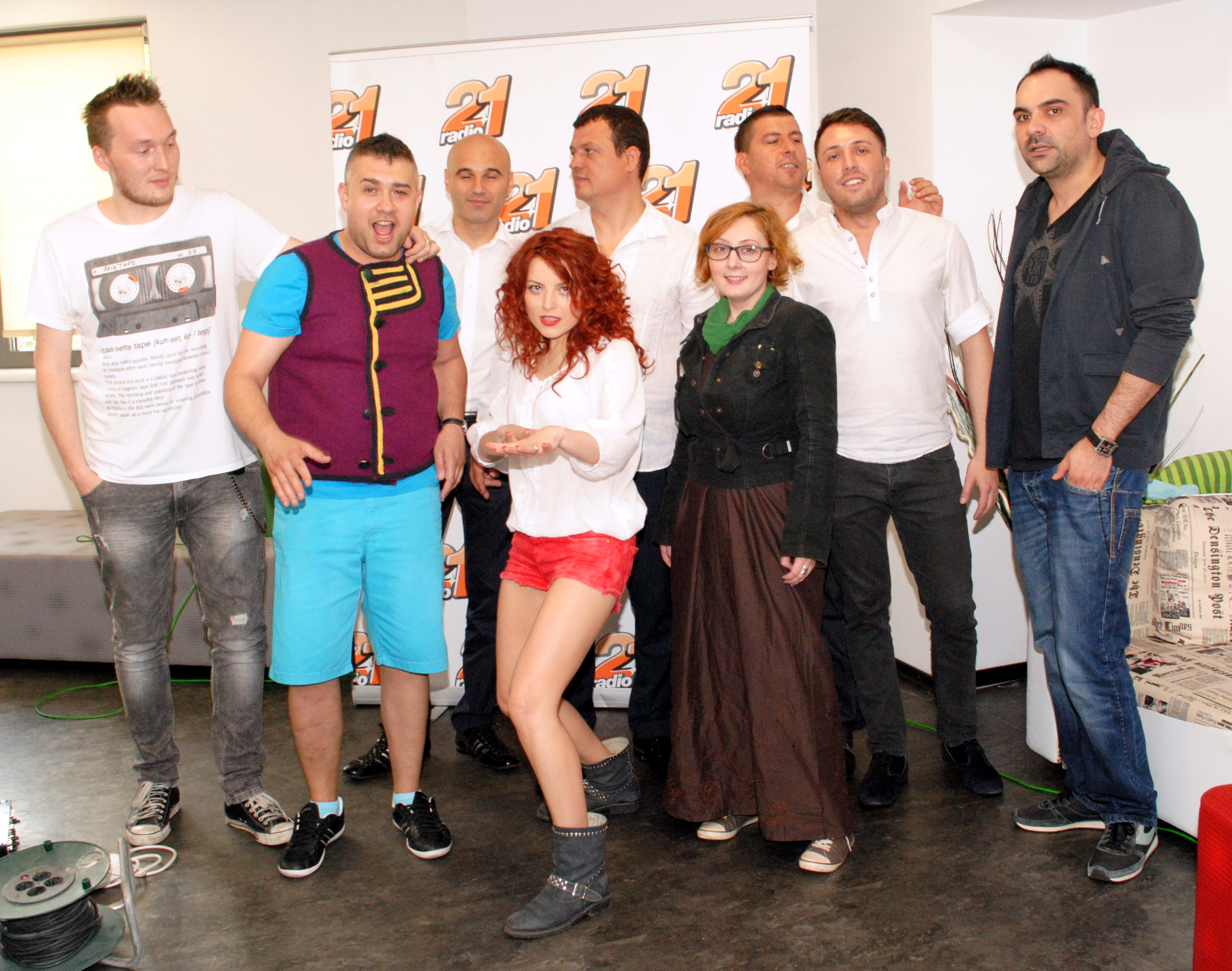 ELENA GHEORGHE & STEAUA DI VREARI @MATINALII 21